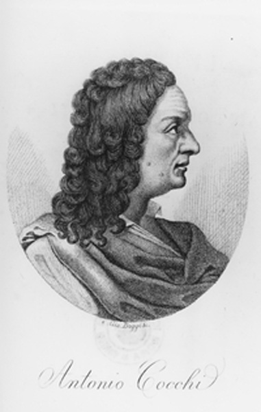 Foto tratta da